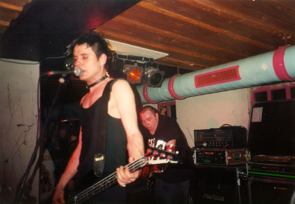 "Zimbl" (Markus Zimmer) und "Reb" (Michael Rebbig) beim THE BATES Konzert im JUZ Eschwege